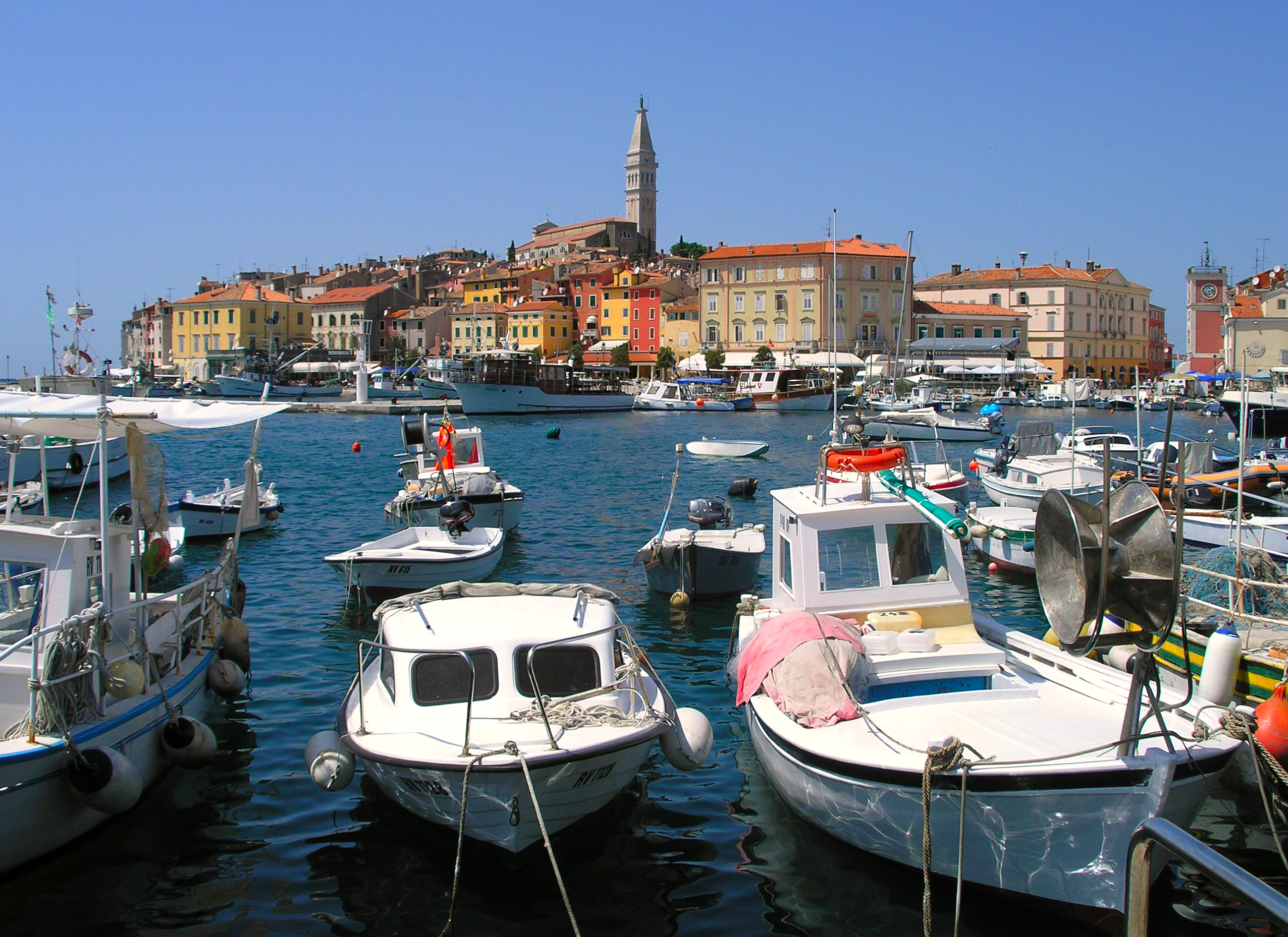 Rovinj, Croatia